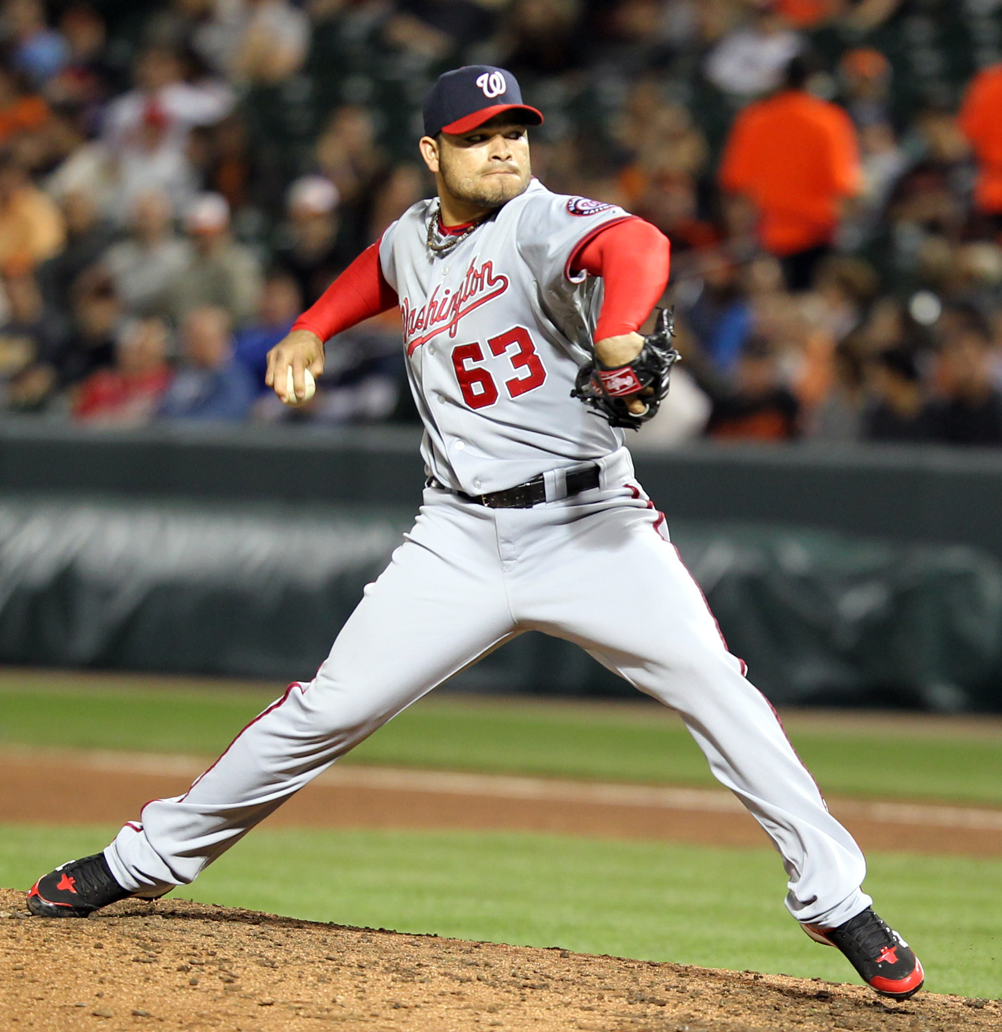 Henry Rodríguez